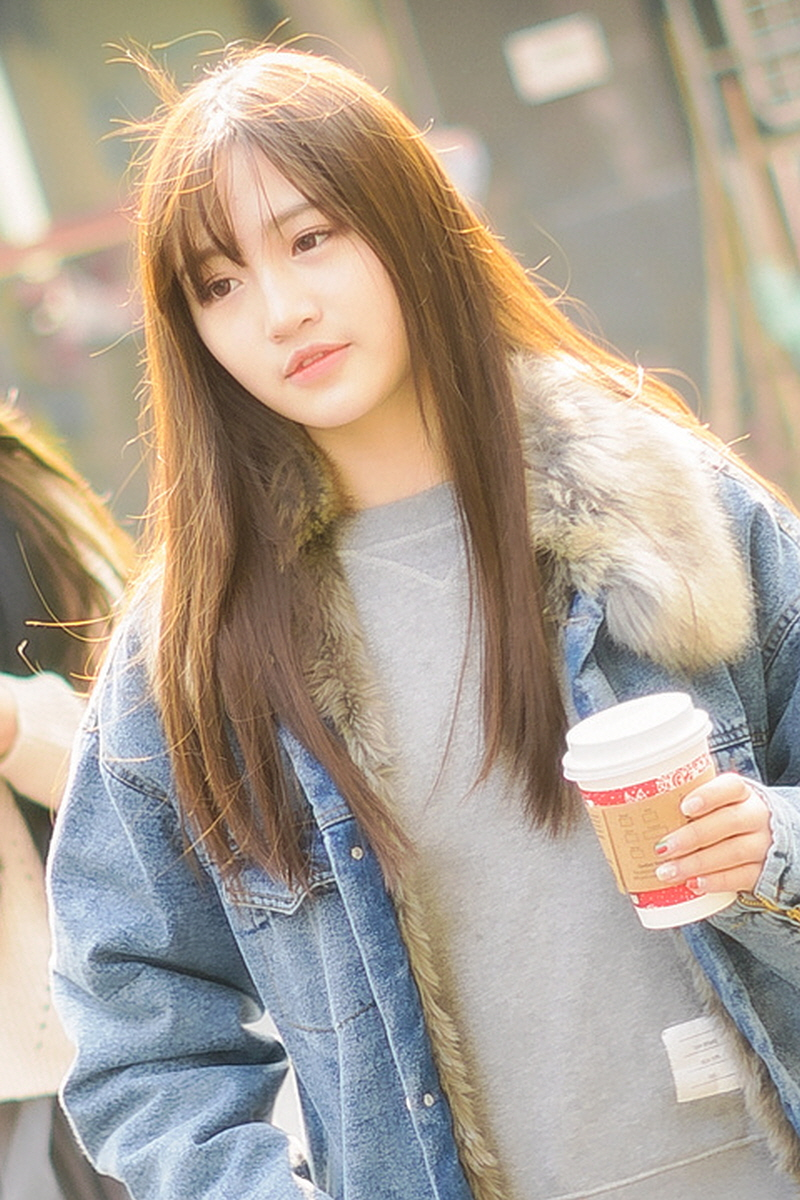 20161207 SNH48 (费沁源, 陈音)